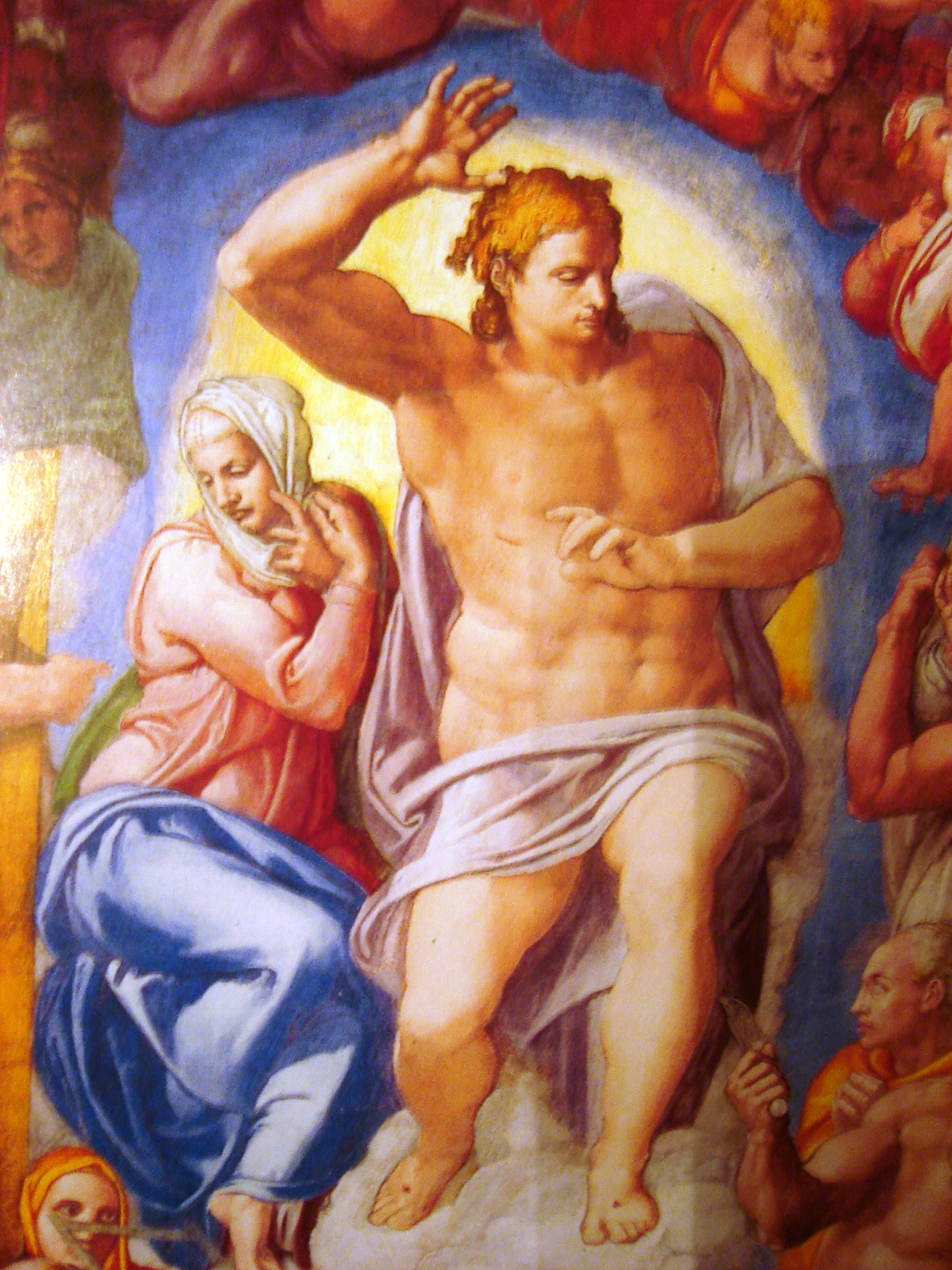 Acercamiento de la pintura de M.A.